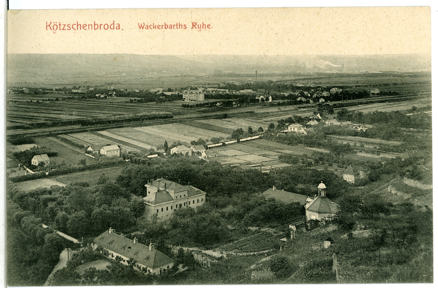 Kötzschenbroda; Wackerbarths Ruhe This postcard is from publisher Brück & Sohn in Meißen ( postcard has a unique number 07469 and is available in a higher resolution at the publisher. This images was uploaded in a cooperation project between Wikipedians and the publisher.